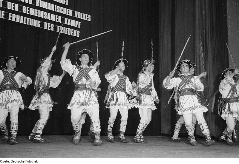 Original image description from the Deutsche Fotothek Rumänische Tänzer des Rahmenprogramms zur Leipziger Herbstmesse 1954